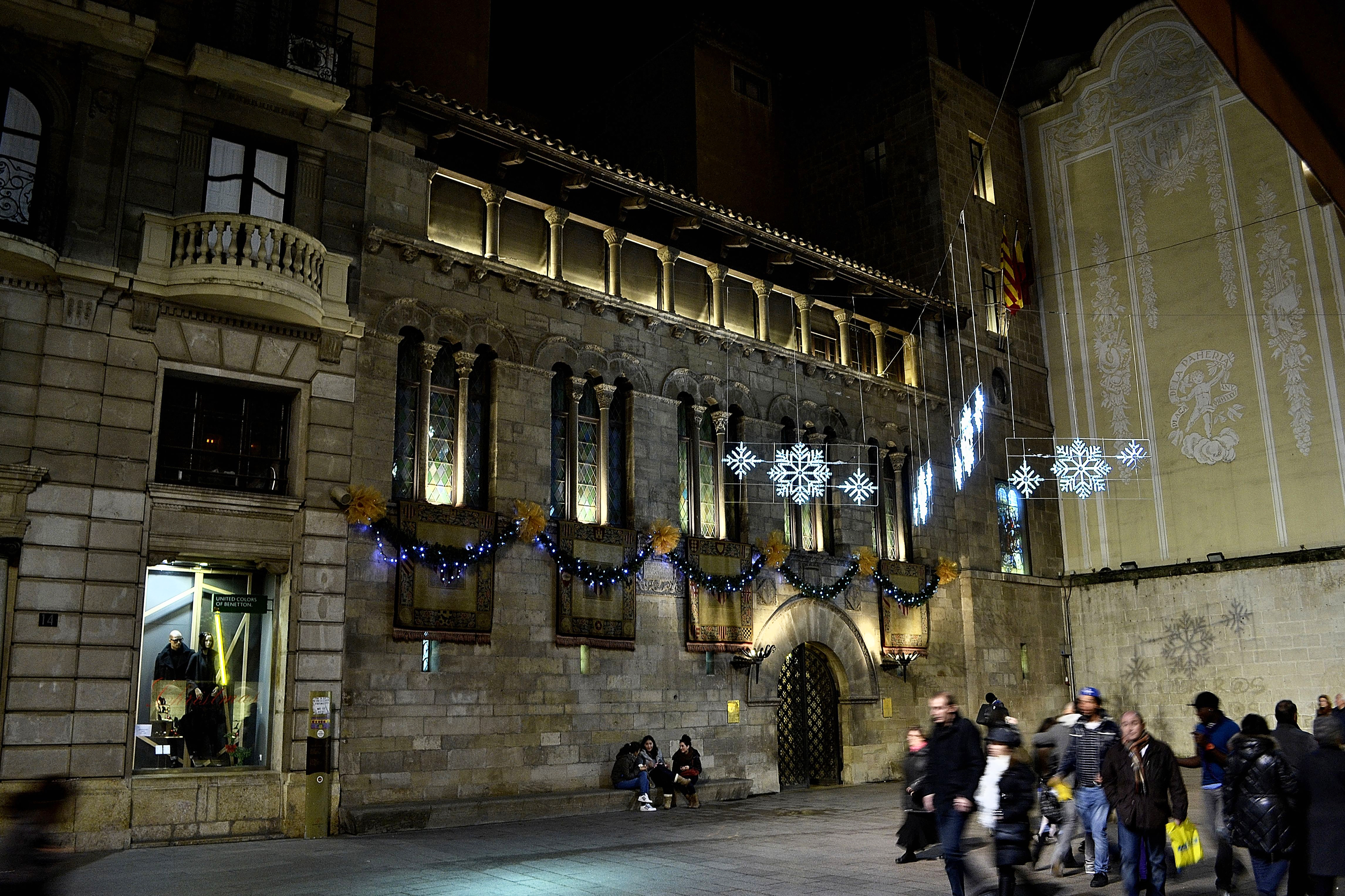 Fachada calle Mayor del Ayuntamiento de Lleida